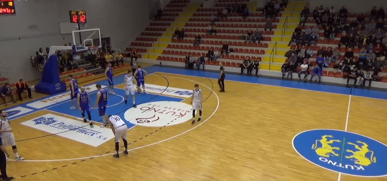 Mecz Polfarmexu Kutno z Pogonią Prudnik.